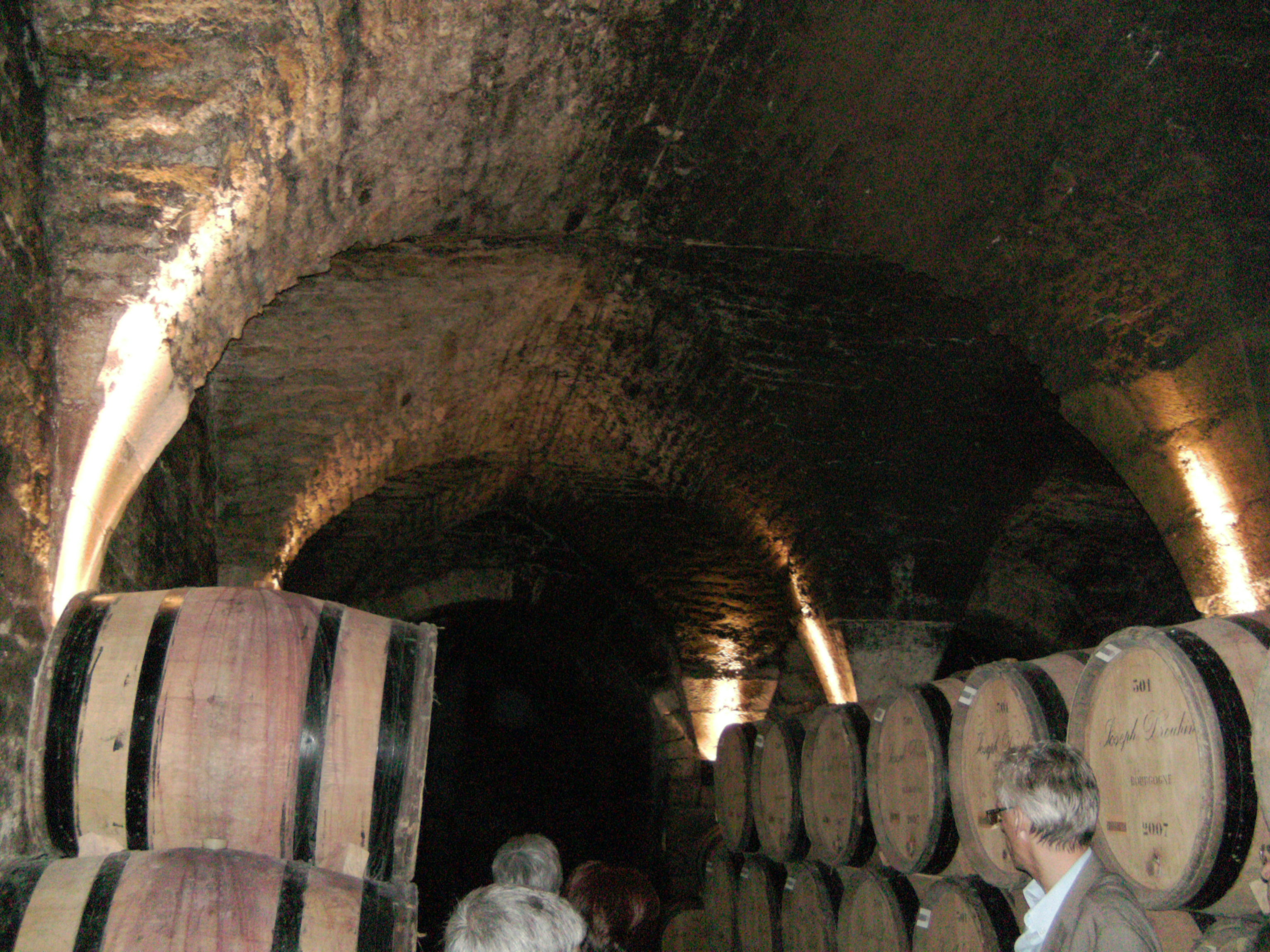 Cave à Beaune